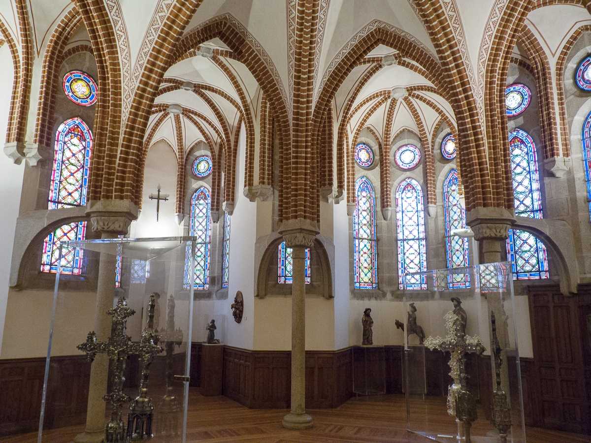 08082013 121722 ASTORGA 0124